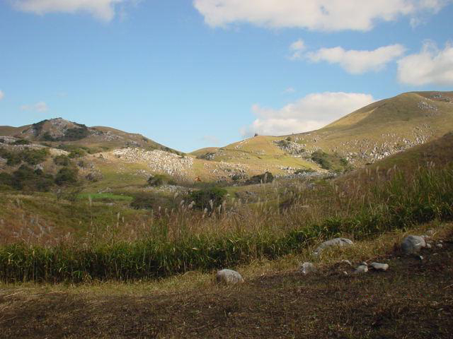 Hiraodai karst plateau, Kitakyushu. Photo taken by Ian Ruxton